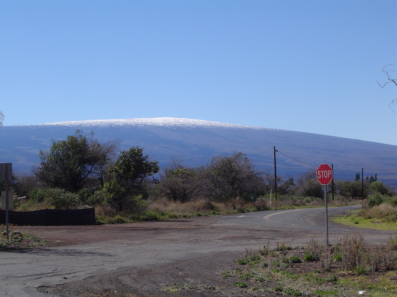 Mauna Loa, Big Island, Hawaii